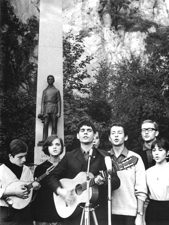 Zentralbild-Kluge 3.10.1967 DDR: Kampfmeeting der Singeklubs am "Denkmal des Kleinen Trompeter". Kampflieder der Arbeiterklasse und neue Jugendlieder erklangen auf einem Kampfmeeting der Singeklubs des Jugendverbandes (FDJ) am "Denkmal des Kleinen Trompeter" in Halle zum Gedenken an Fritz Weineck, der 1925 bei einer Demonstration im Volkspark ermordet wurde. Hartmut König (Bildmitte) vom Oktoberklub Berlin schrieb die deutsche Nachdichtung des Liedes "Die Front der Patrioten ruft" von Mikes Theodorakis, das hier vorgetragen wird. Vom 25. - 30.9.1967 trafen sich 16 Singeklubs und 25 Kollektivbeobachter im Pionierhaus "Fritz Weineck" in Halle zu einer Werkstattwoche. Dieser große Erfahrungsaustausch an dem auch Textautoren, Komponisten und Künstler mitwirkten wird den insgesamt 500 Singeklubs und -gruppen, die in der Deutschen Demokratischen Republik bestehen, den Weg weisen und ihnen eine Hilfe sein.